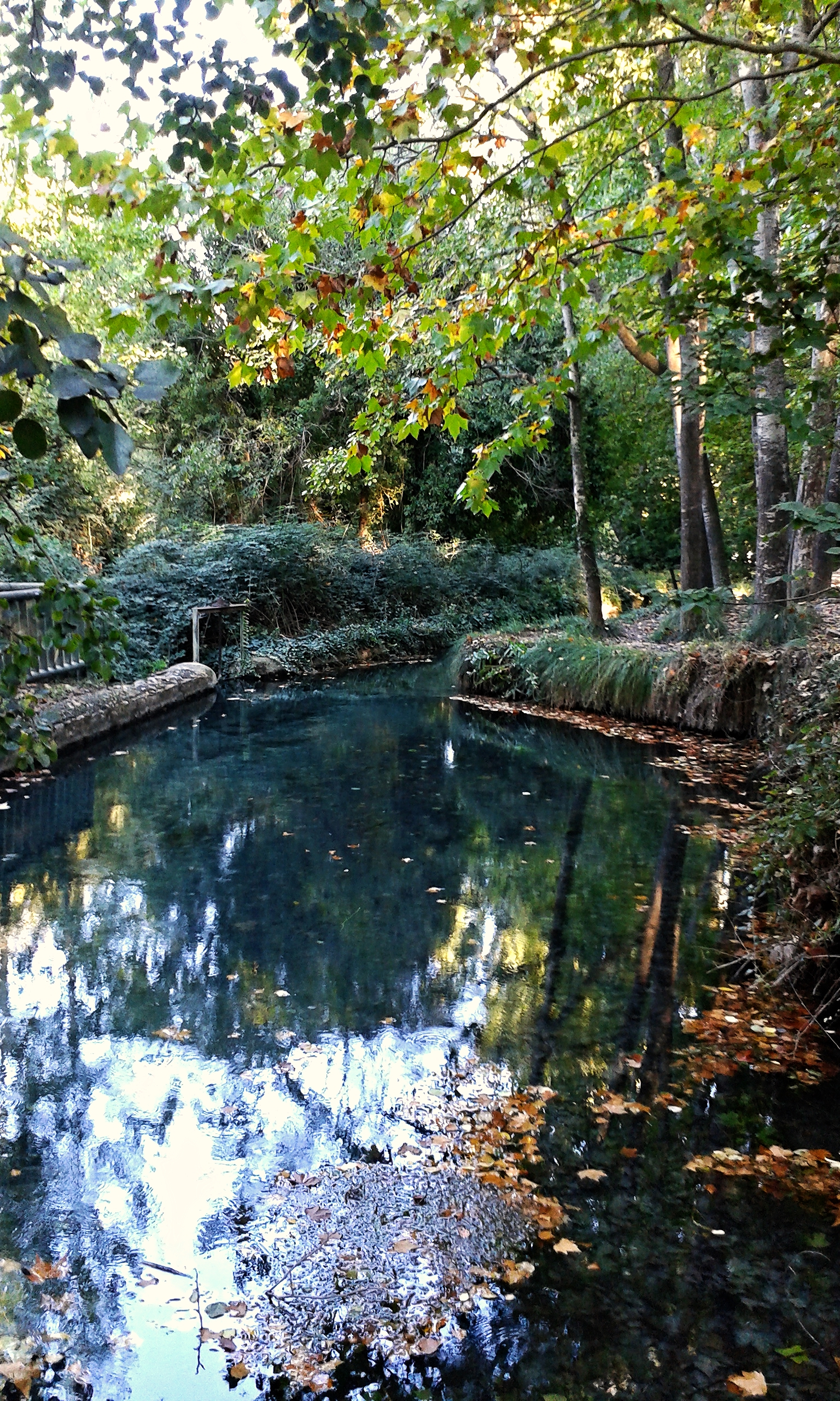 Fuentes del Marqués (Caravaca de la Cruz).